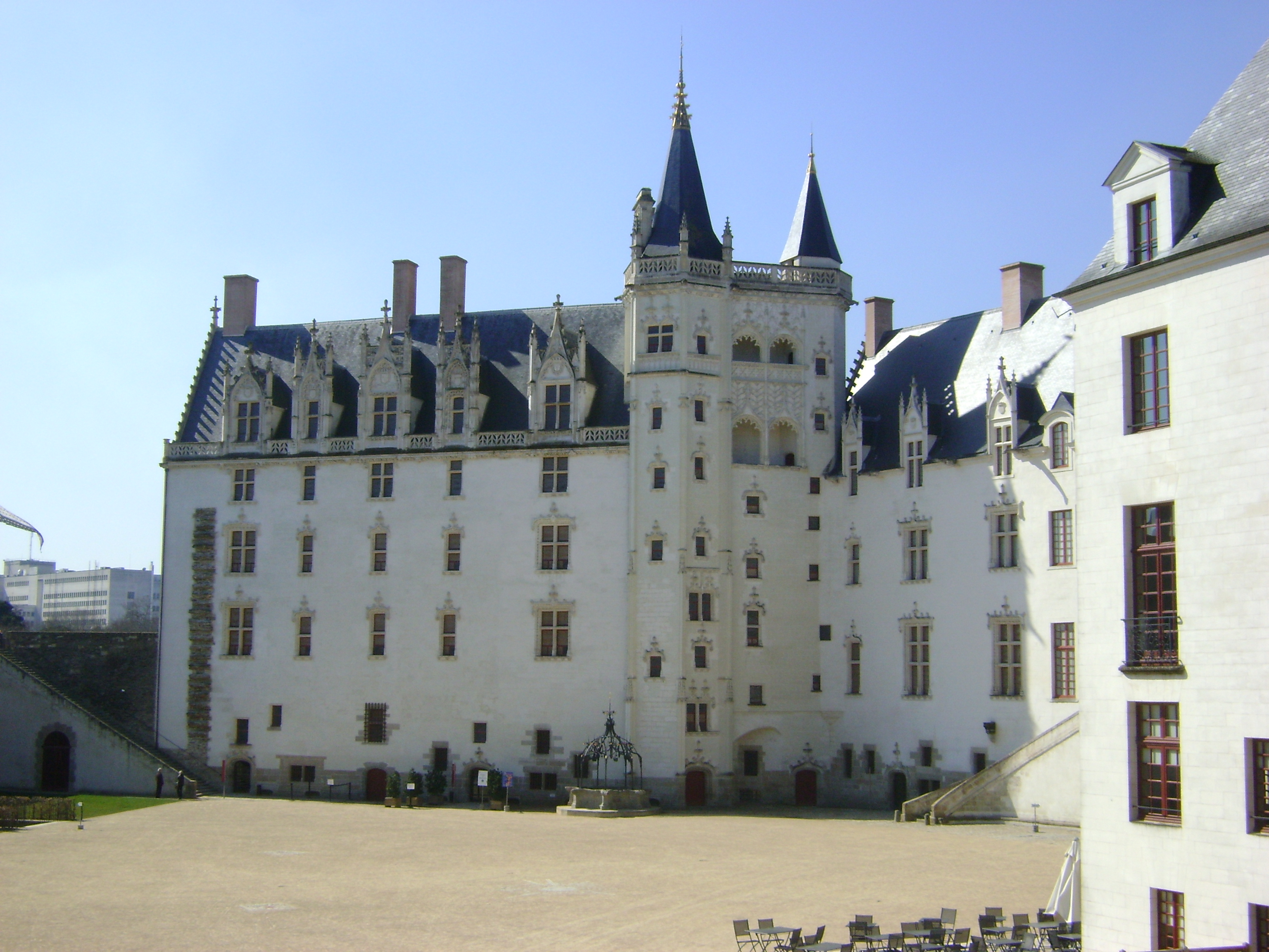 Château des Ducs de Bretagne, Nantes. Le Grand Logis et la Tour de la Couronne d'Or .